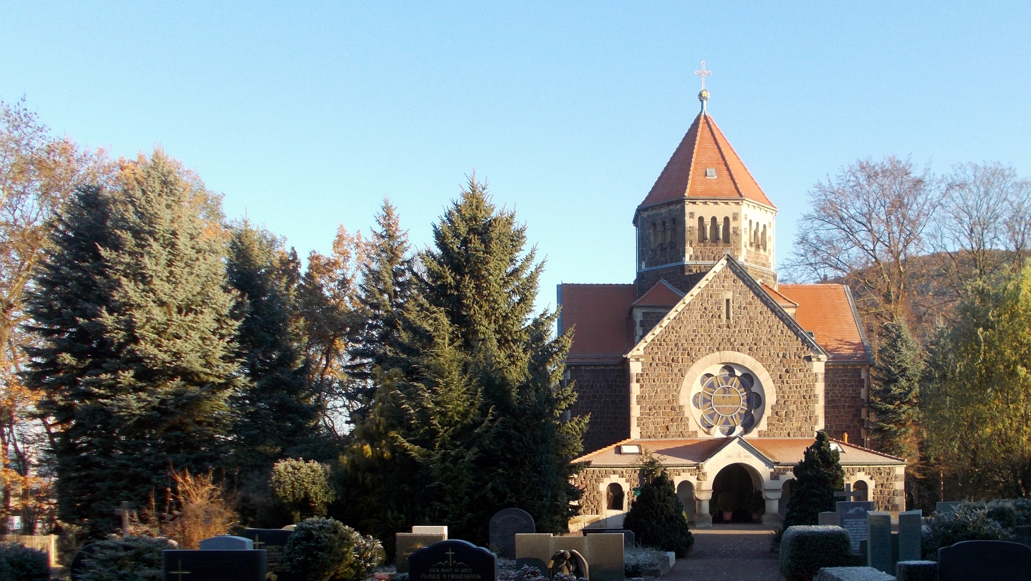 2016 Johannisfriedhof Freital Deuben.jpg